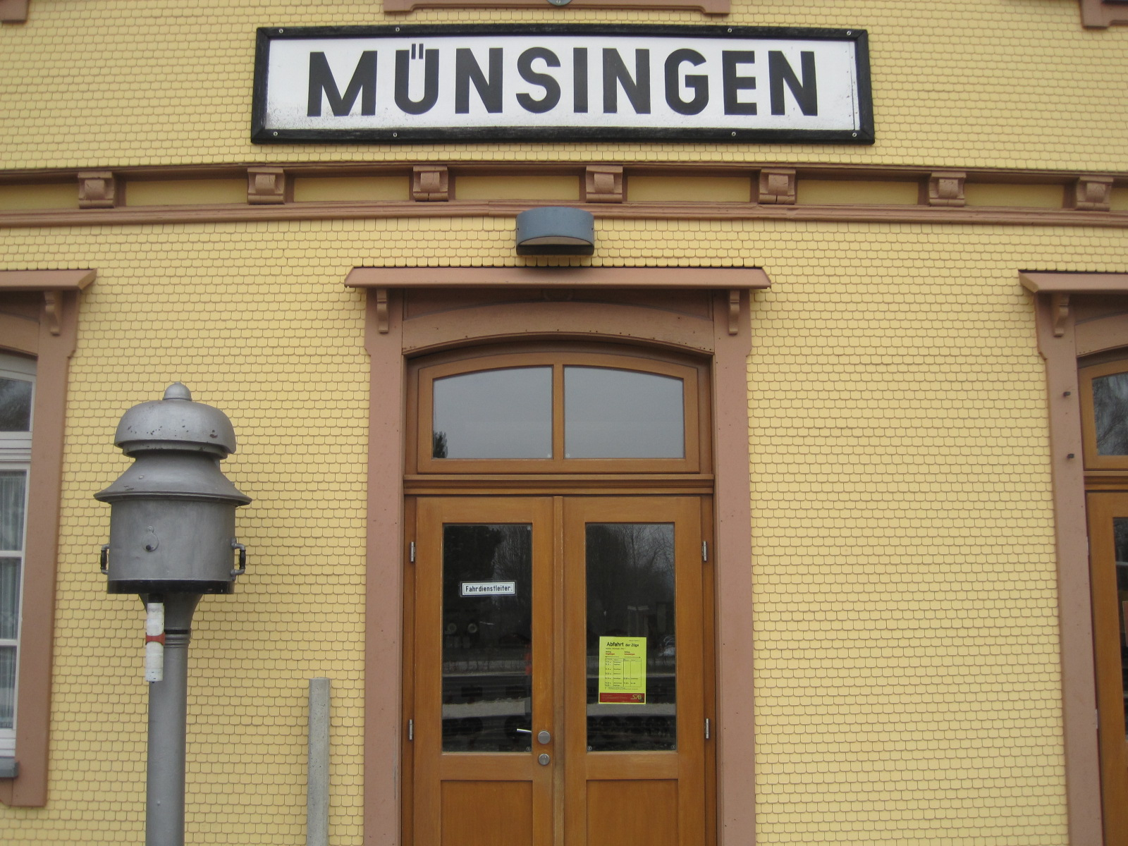 Eingang zum historischen Hebel Stellwerk von 1907 im Bahnhof Münsingen.